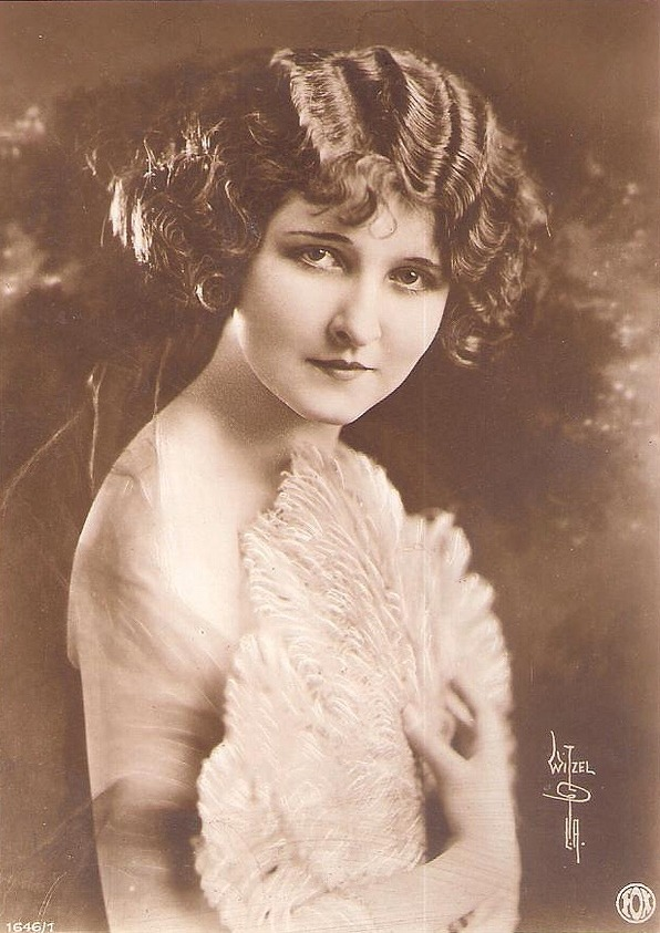 Gladys McConnell